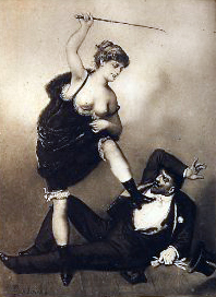 Illustration de Władysław Bakałowicz pour Sacher-Masoch. La Vénus à la fourrure, roman sur la flagellation, publié en 1902 dans une traduction de Raphaël Ledos de Beaufort